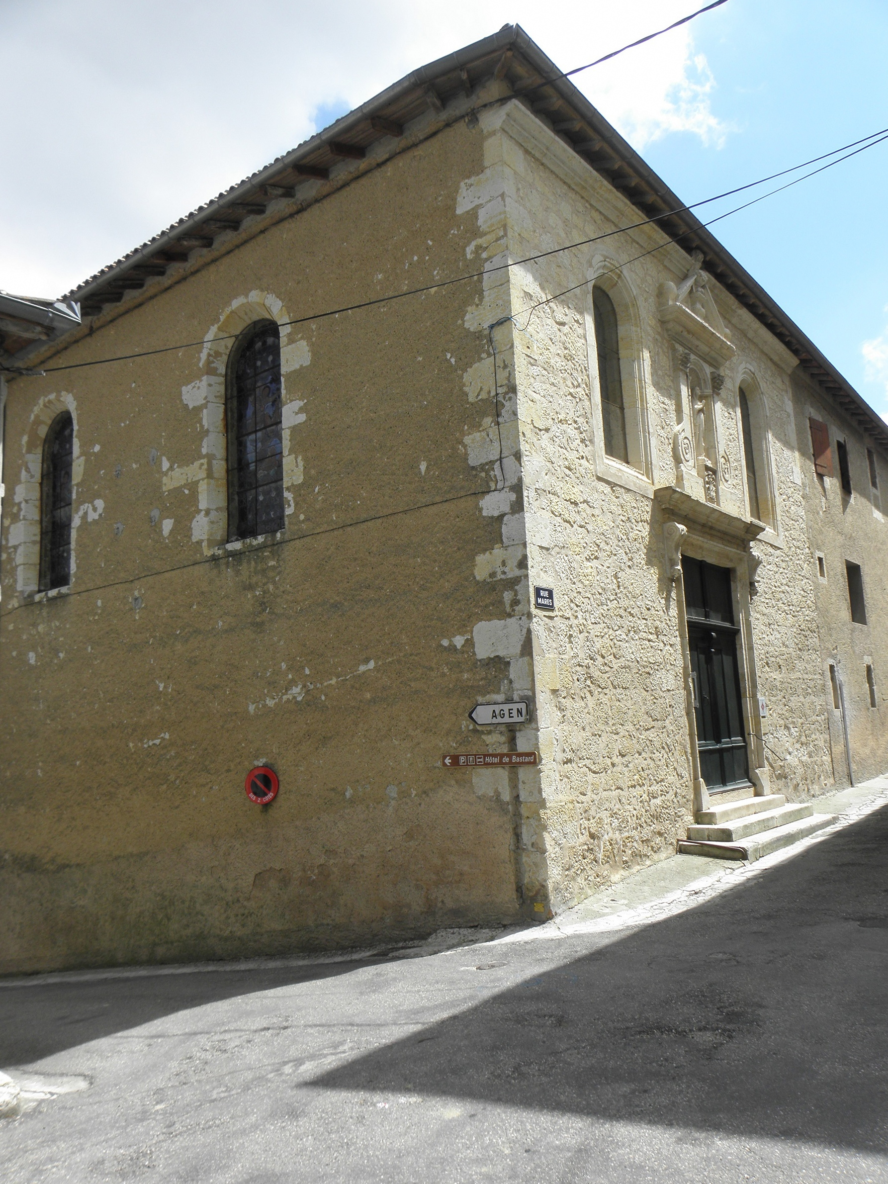 Chapelle du Carmel de Lectoure (32). Façade principale et flanc ouest.